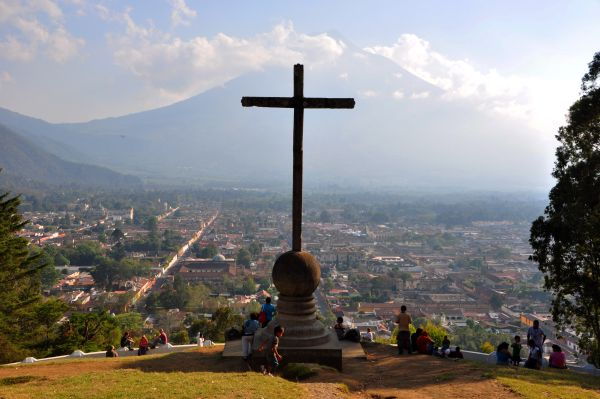 tawal chin a saya yowalil tol ix ach